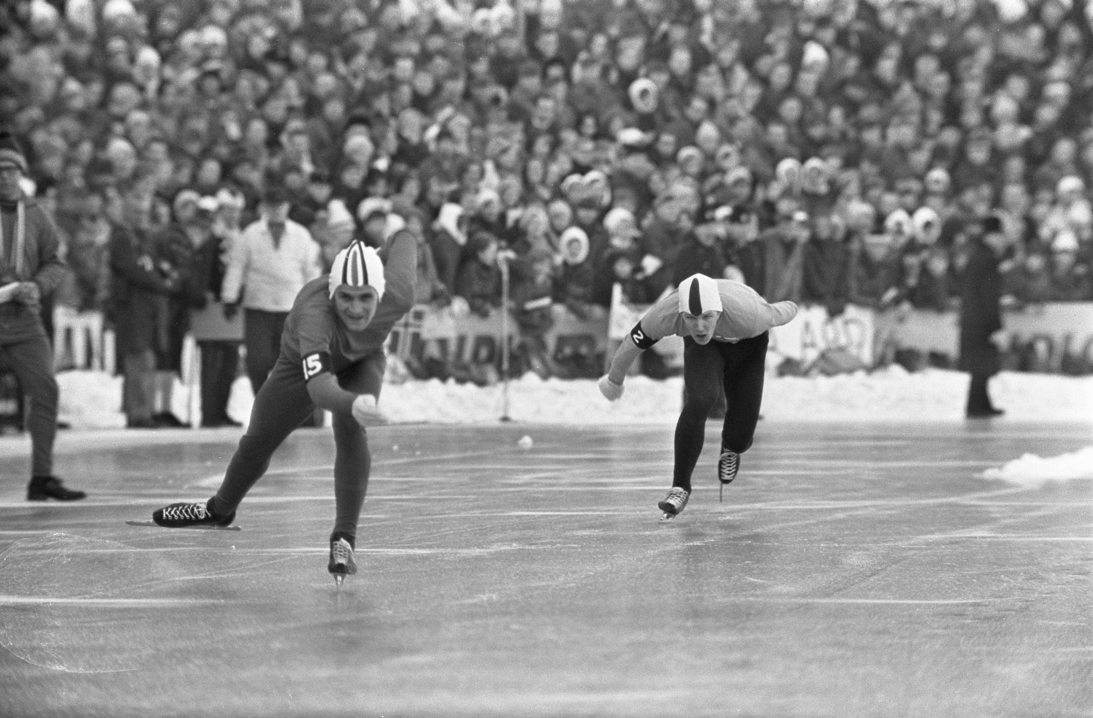 Collectie / Archief : Fotocollectie Anefo Reportage / Serie : [ onbekend ] Beschrijving : Europese Schaatskampioenschappen te Oslo, nummer 4, 5 en Bols, nummer 6 Koskinen Datum : 28 januari 1968 Locatie : Oslo Trefwoorden : SCHAATSKAMPIOENSCHAPPEN Persoonsnaam : BOLS Fotograaf : Kroon, Ron / Anefo Auteursrechthebbende : Nationaal Archief Materiaalsoort : Negatief (zwart/wit) Nummer archiefinventaris : bekijk toegang 2.24.01.05 Bestanddeelnummer : 921-0290